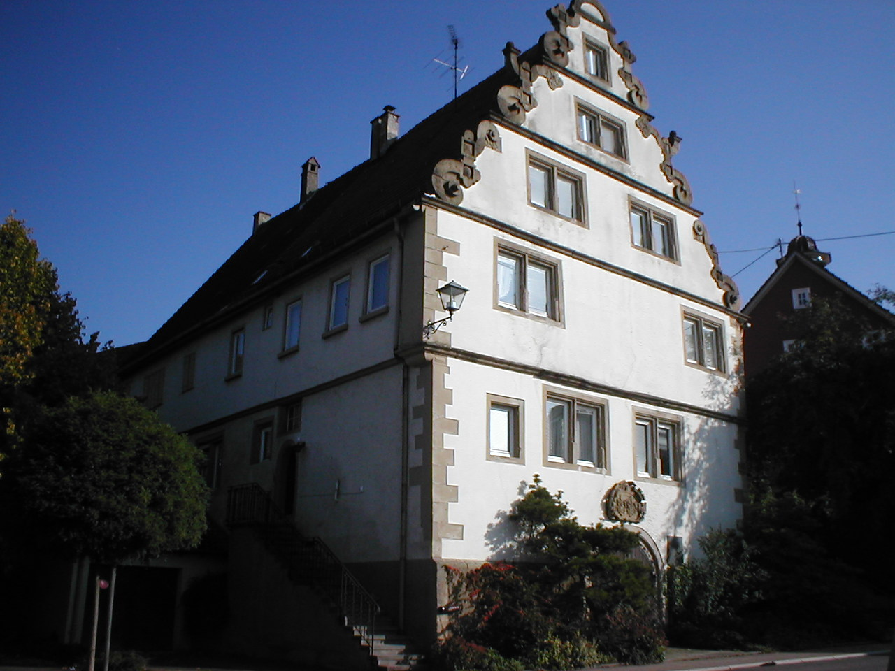 Chanofsky'sches Schlößchen in Brettach, erbaut 1595